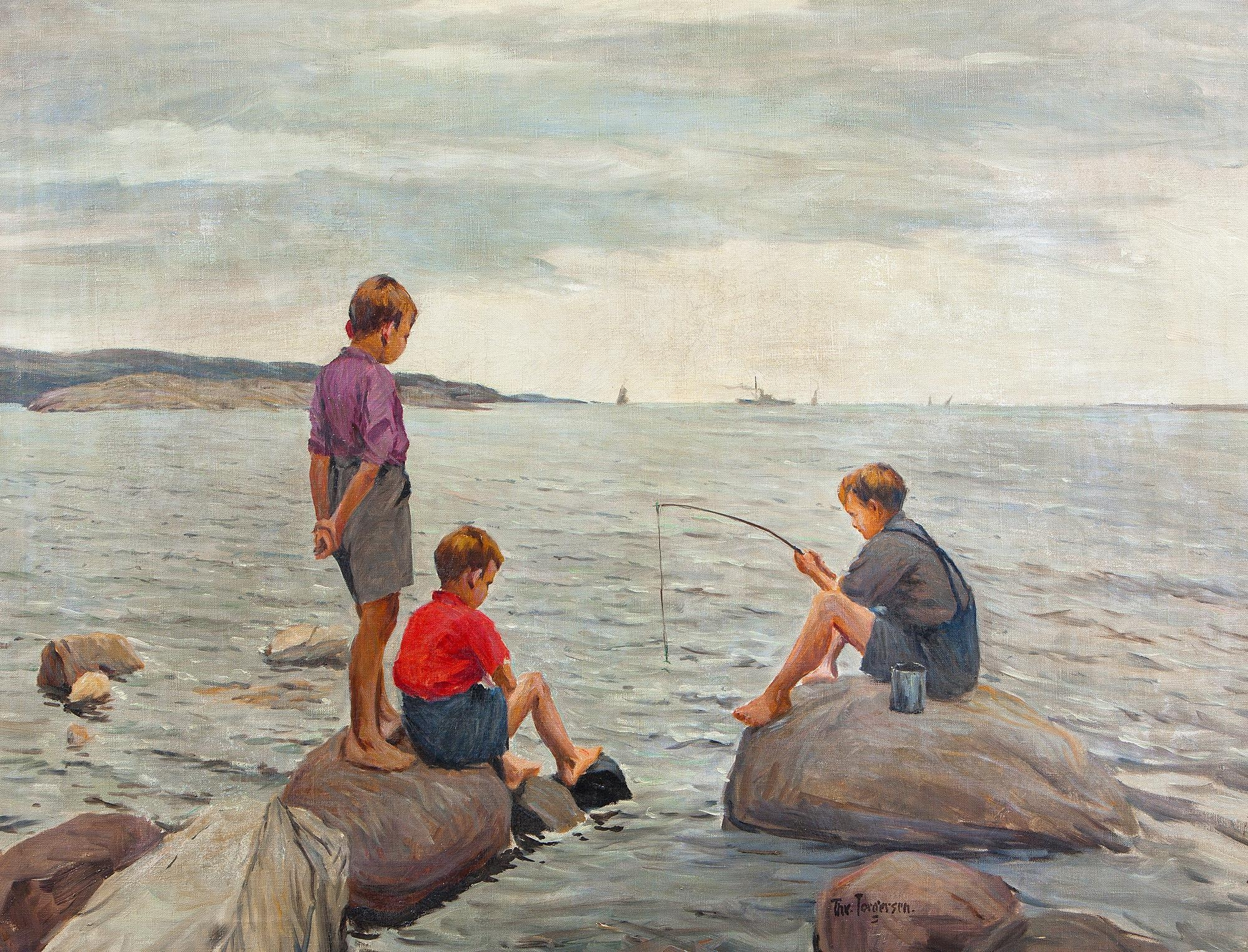 Gutter som fisker